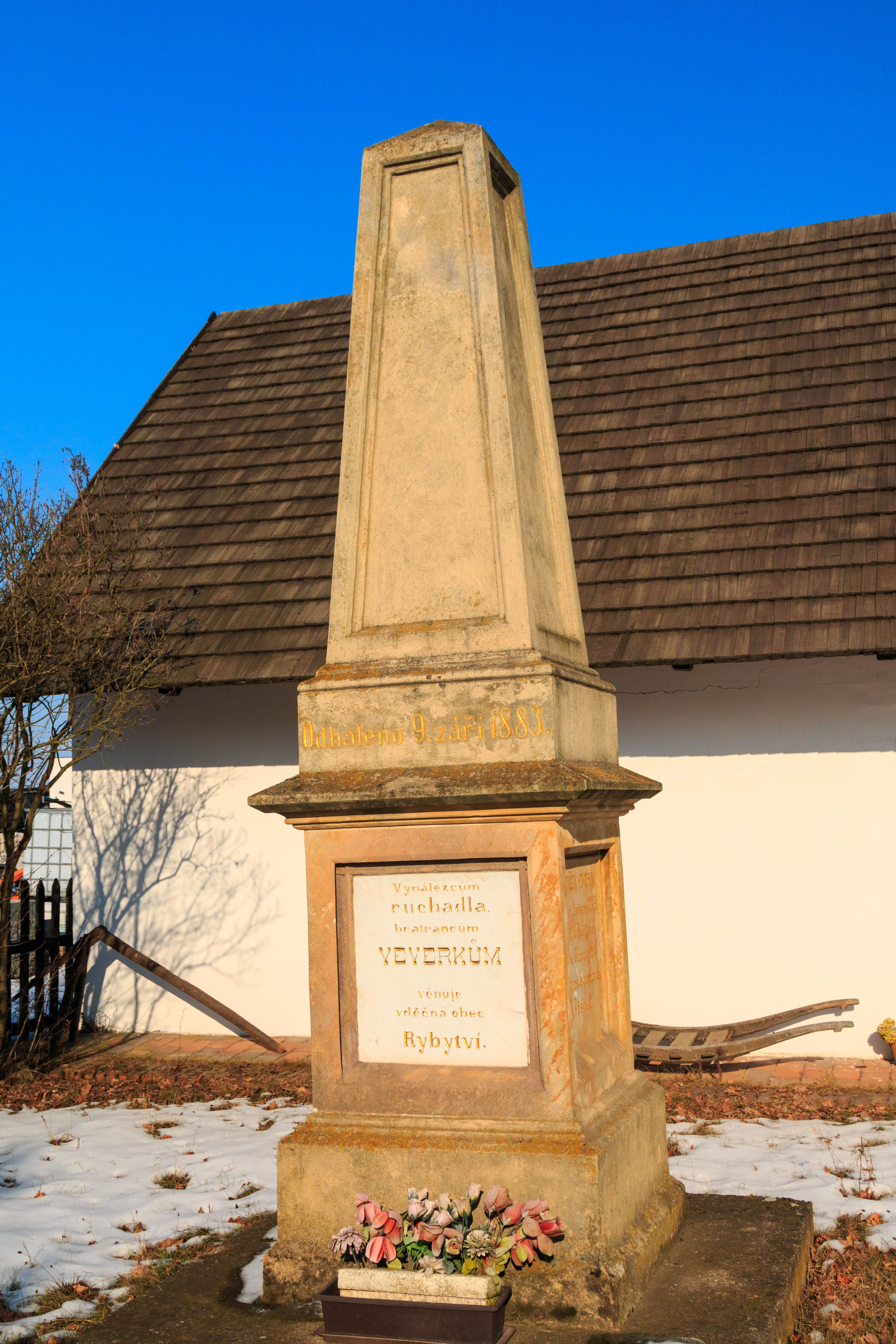 Rodný dům Václava Veverky, Veverkova 10, Rybitví.